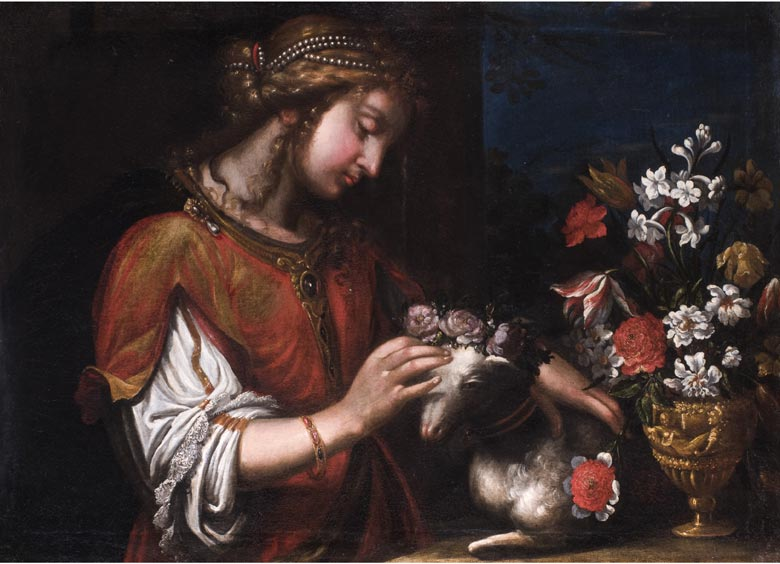 Saint Agnes